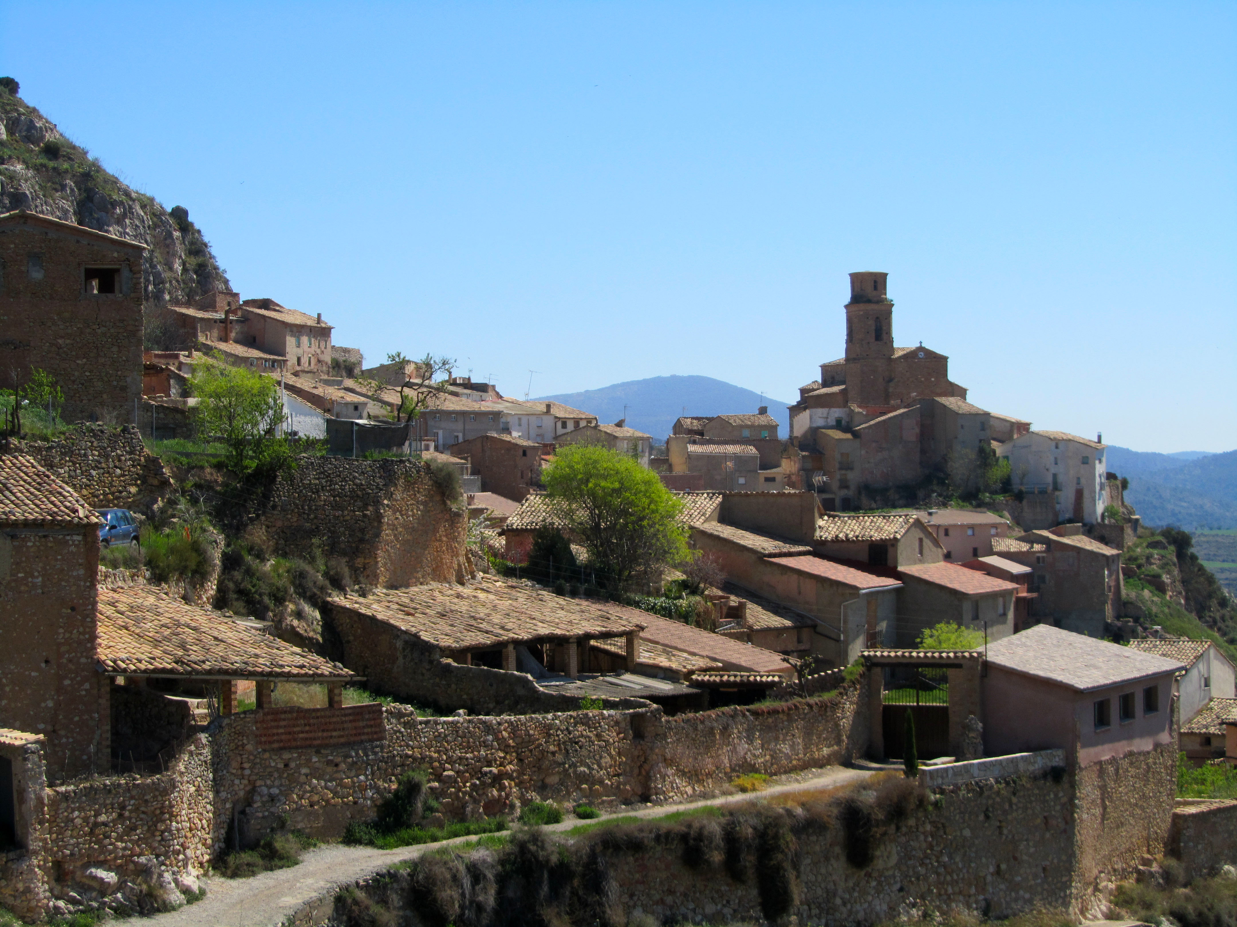 Anvista de Calasanz, un lugar d'o municipio de Peralta de Calasanz, en a comarca aragonesa d'a Litera.